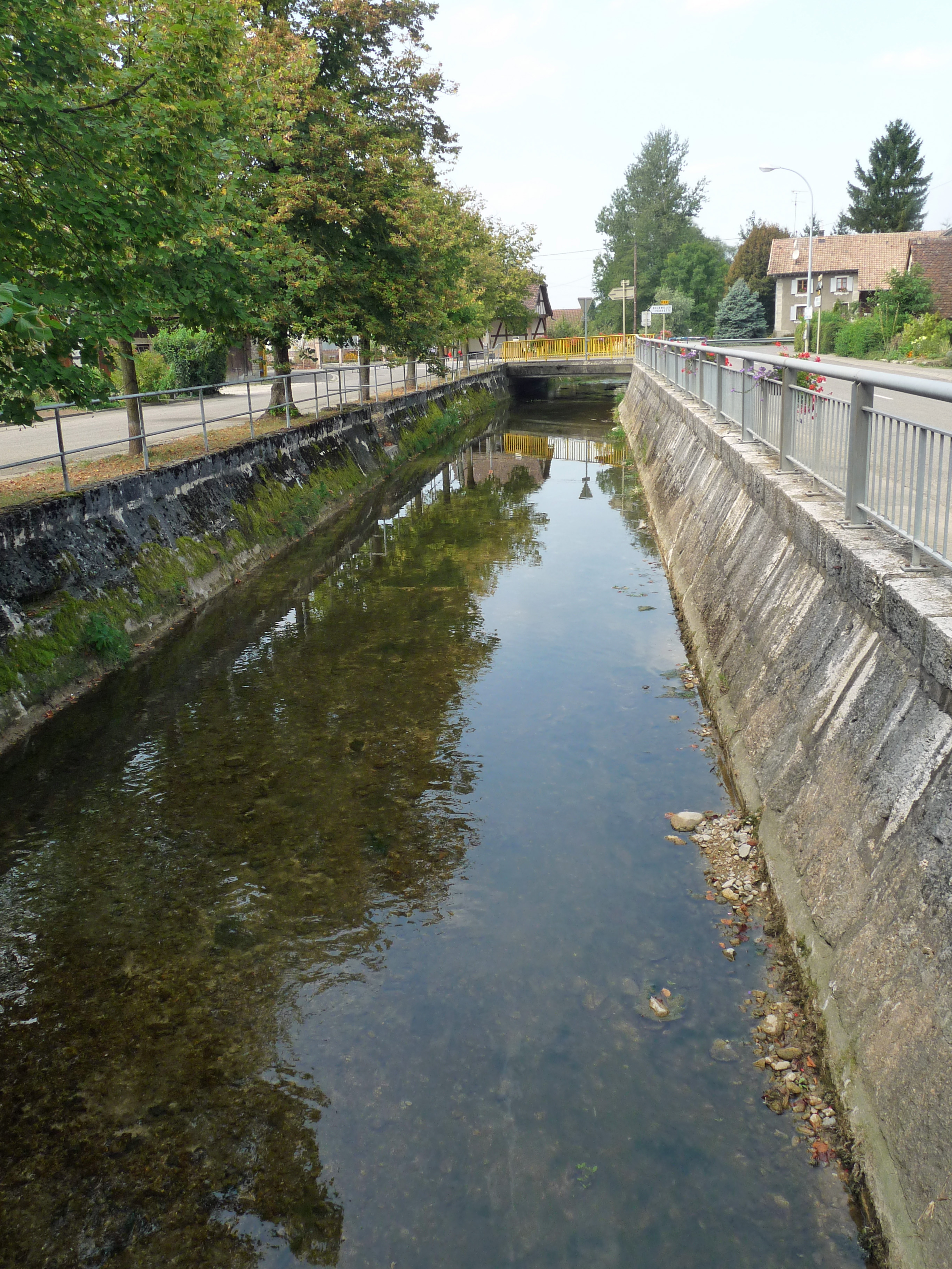 Fislis (Haut-Rhin) : canal de dérivation de l'Ill